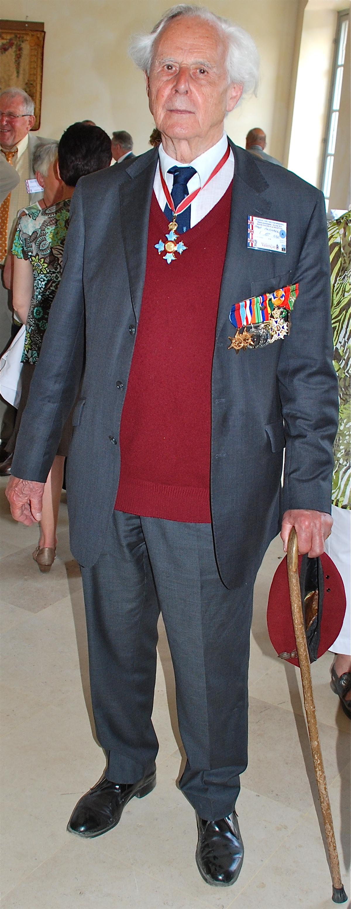 Michael R. D. Foot, Valençay, 6 mai 2011